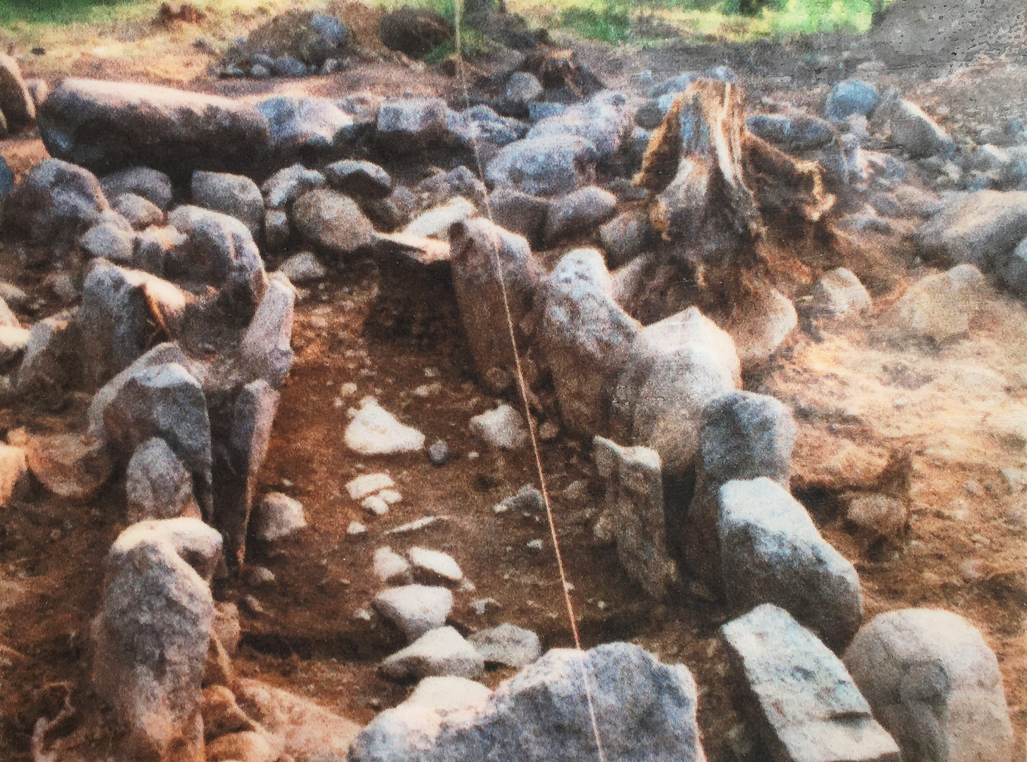 Från utgrävningen av Albykistan. Fotografiet finns på en stadigvarande informationstavla (utomhus) intill Stendalspromenaden.